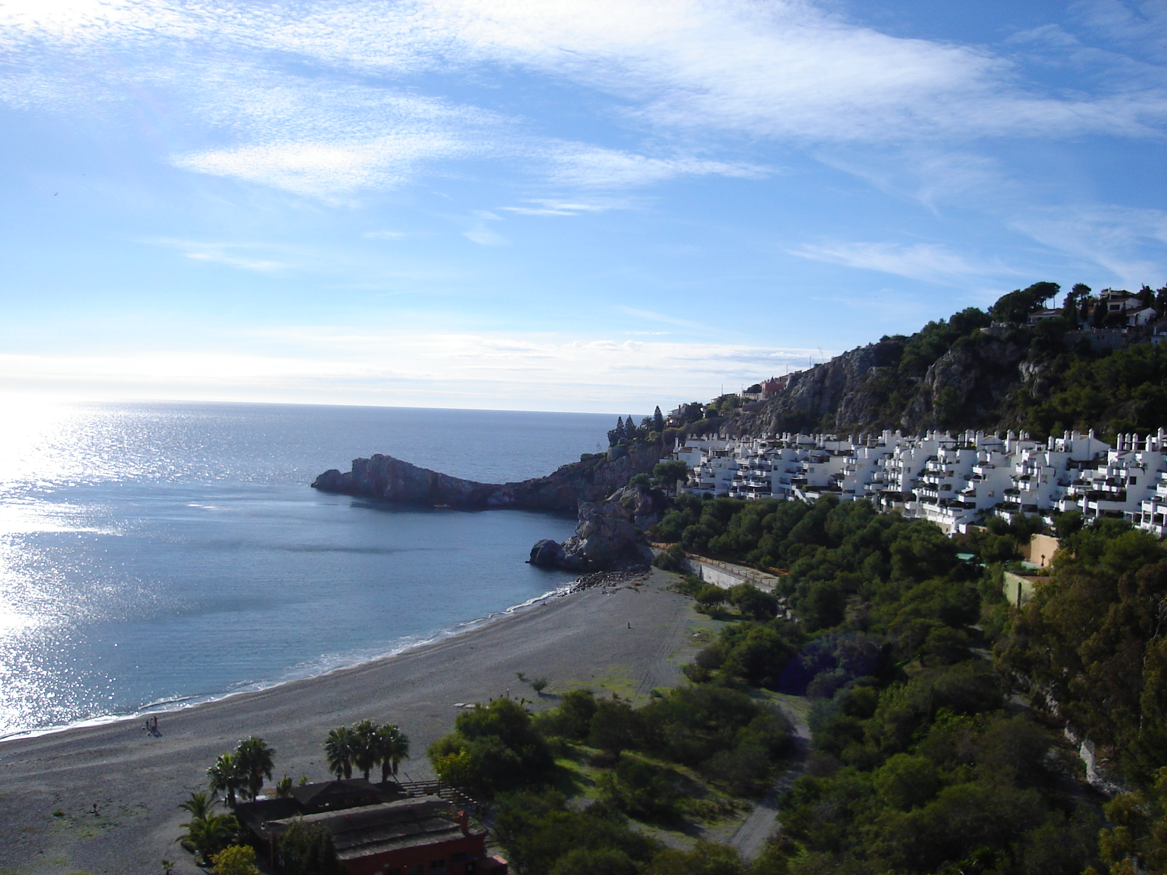 Playa del puerto deportivo de Marina del Este, en Almuñécar, Granada.